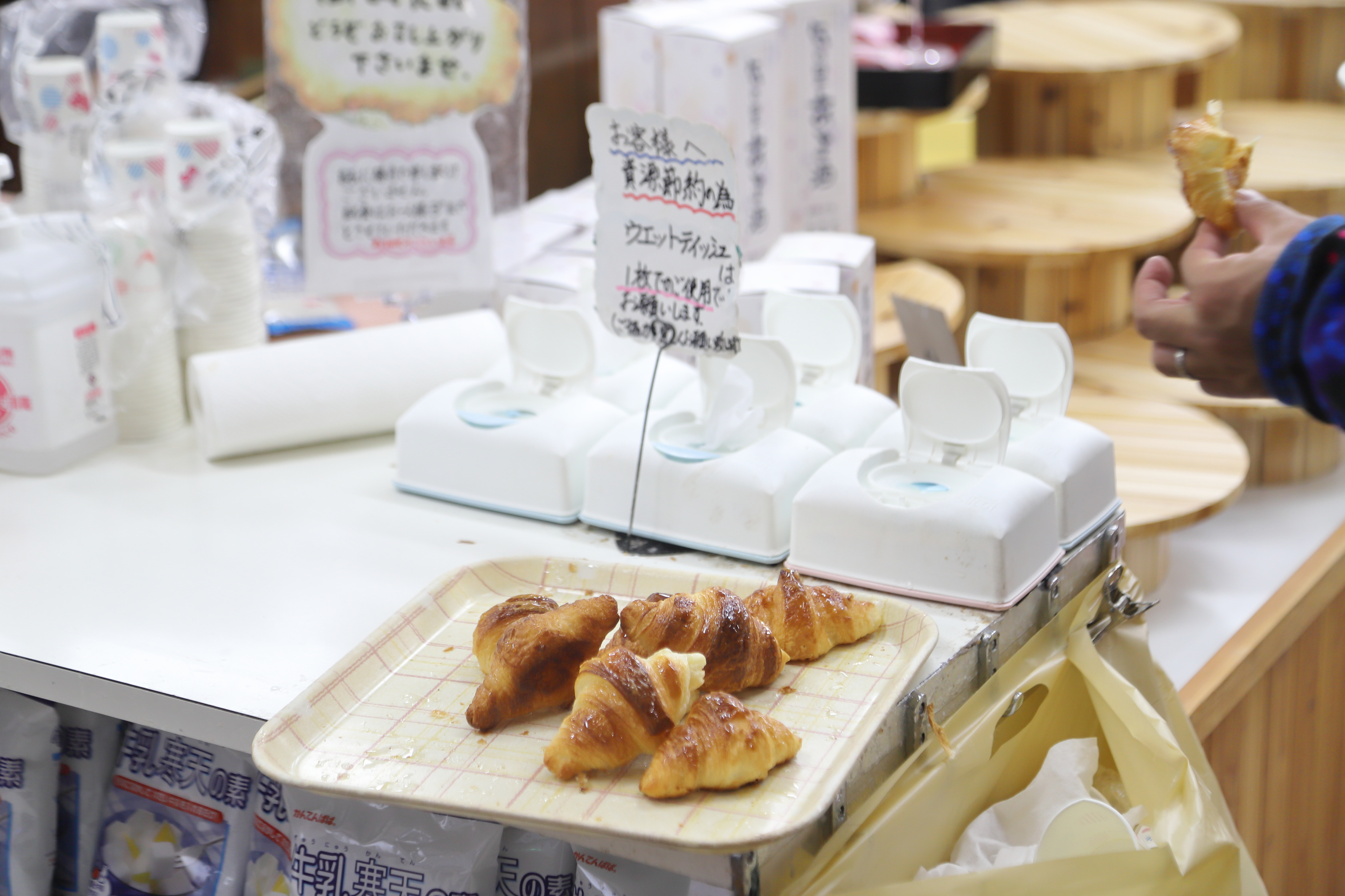 道の駅南アルプスむら長谷「パンや」店頭で販売されているクロワッサンの試食。